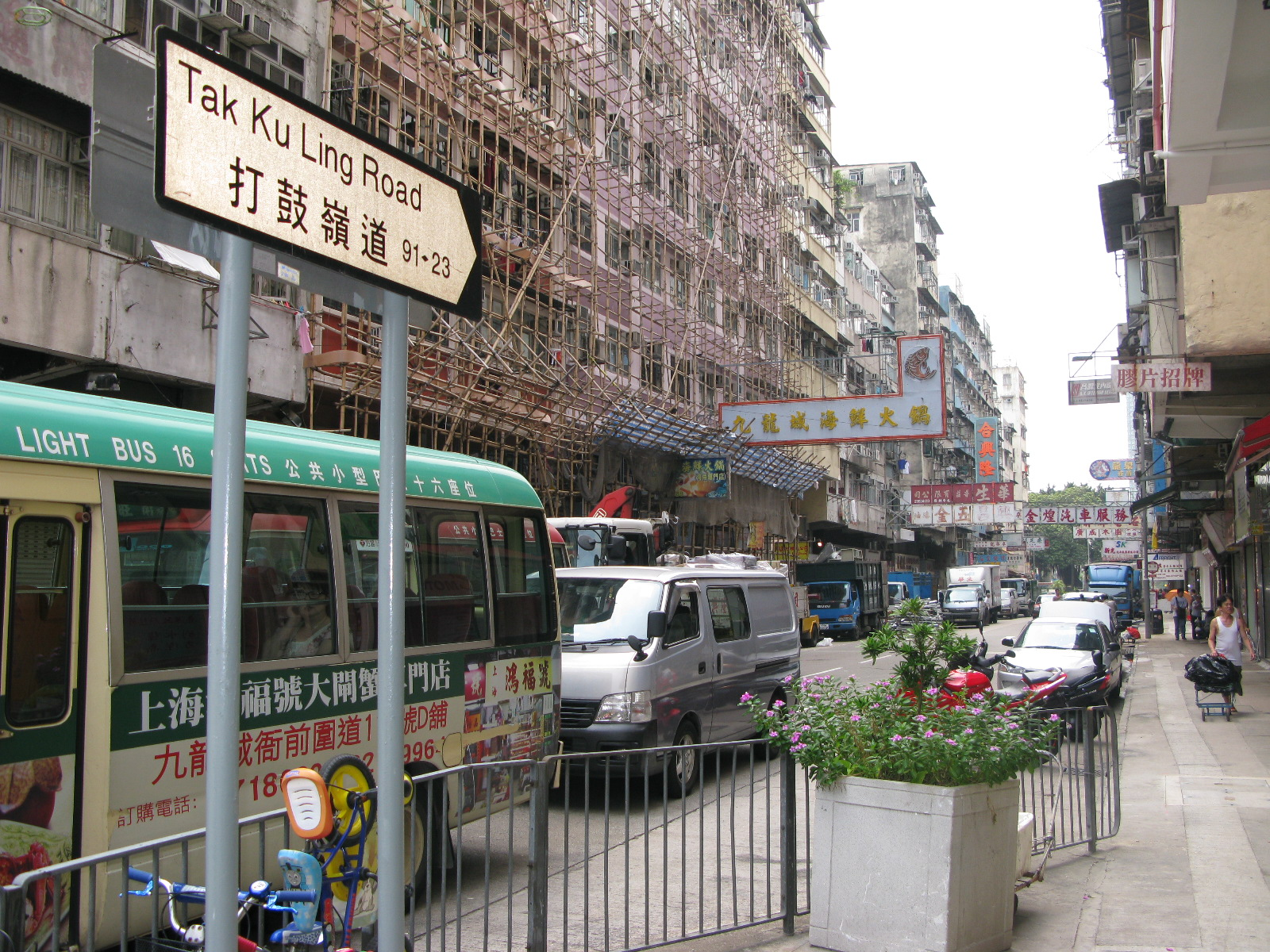 中文（香港）: 香港九龍城打鼓嶺道